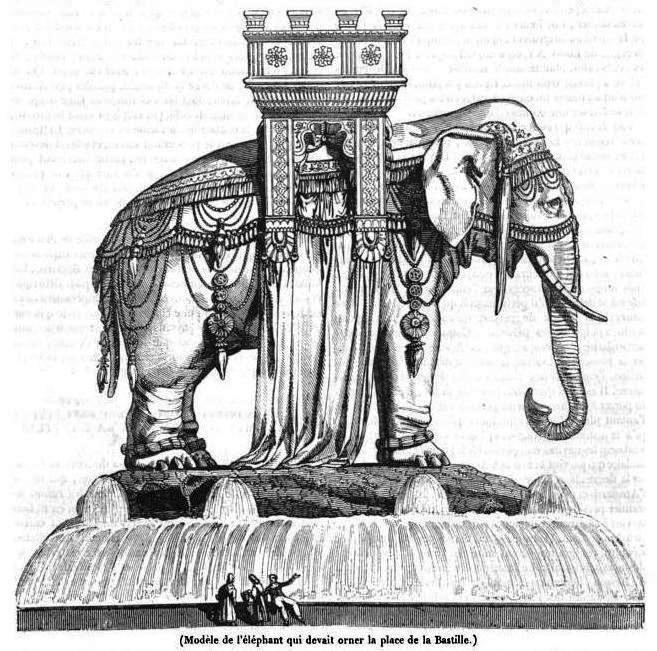 "Modèle de l'éléphant qui devait orner la place de la Bastille."